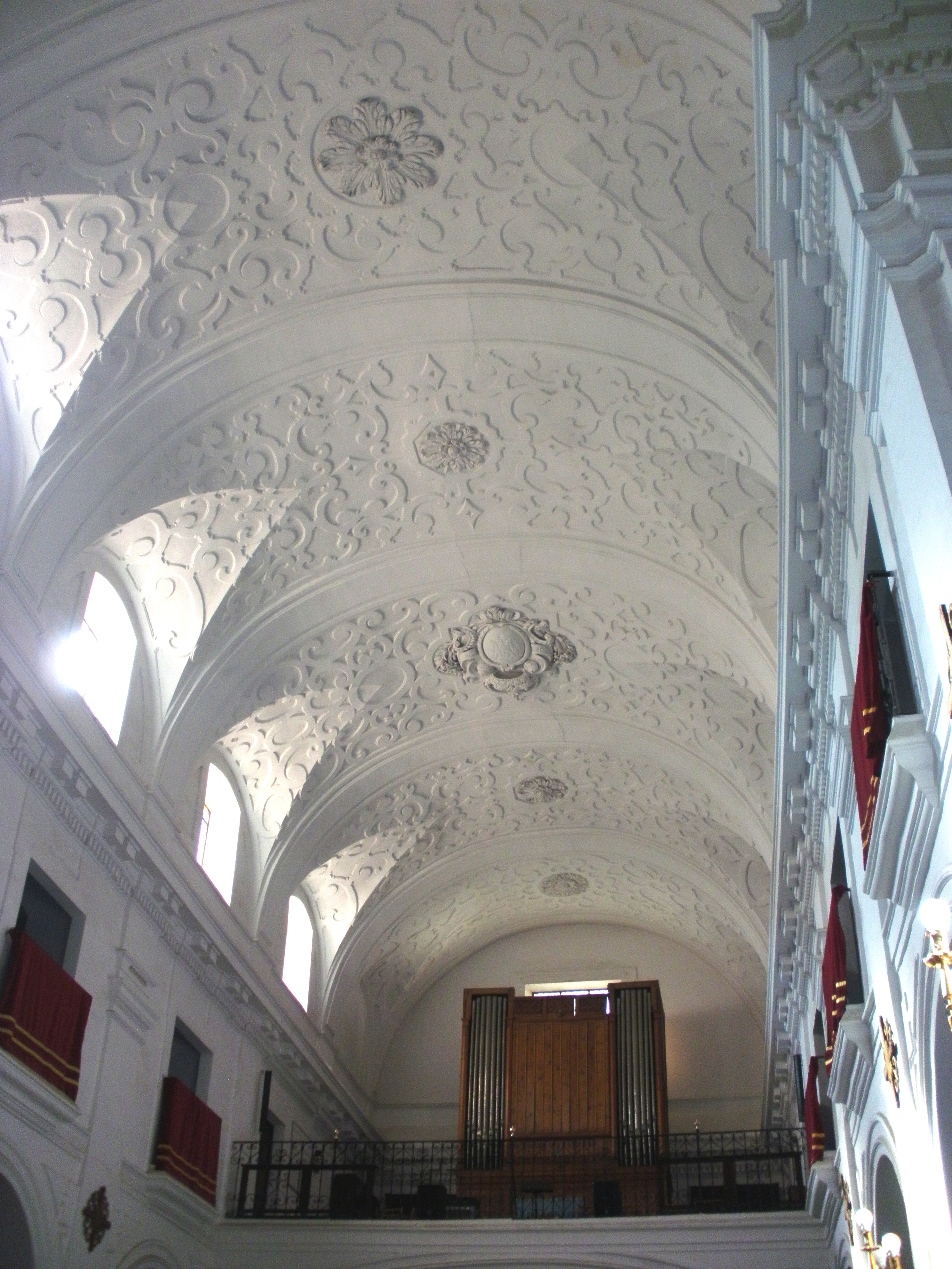 vista general de la bóveda